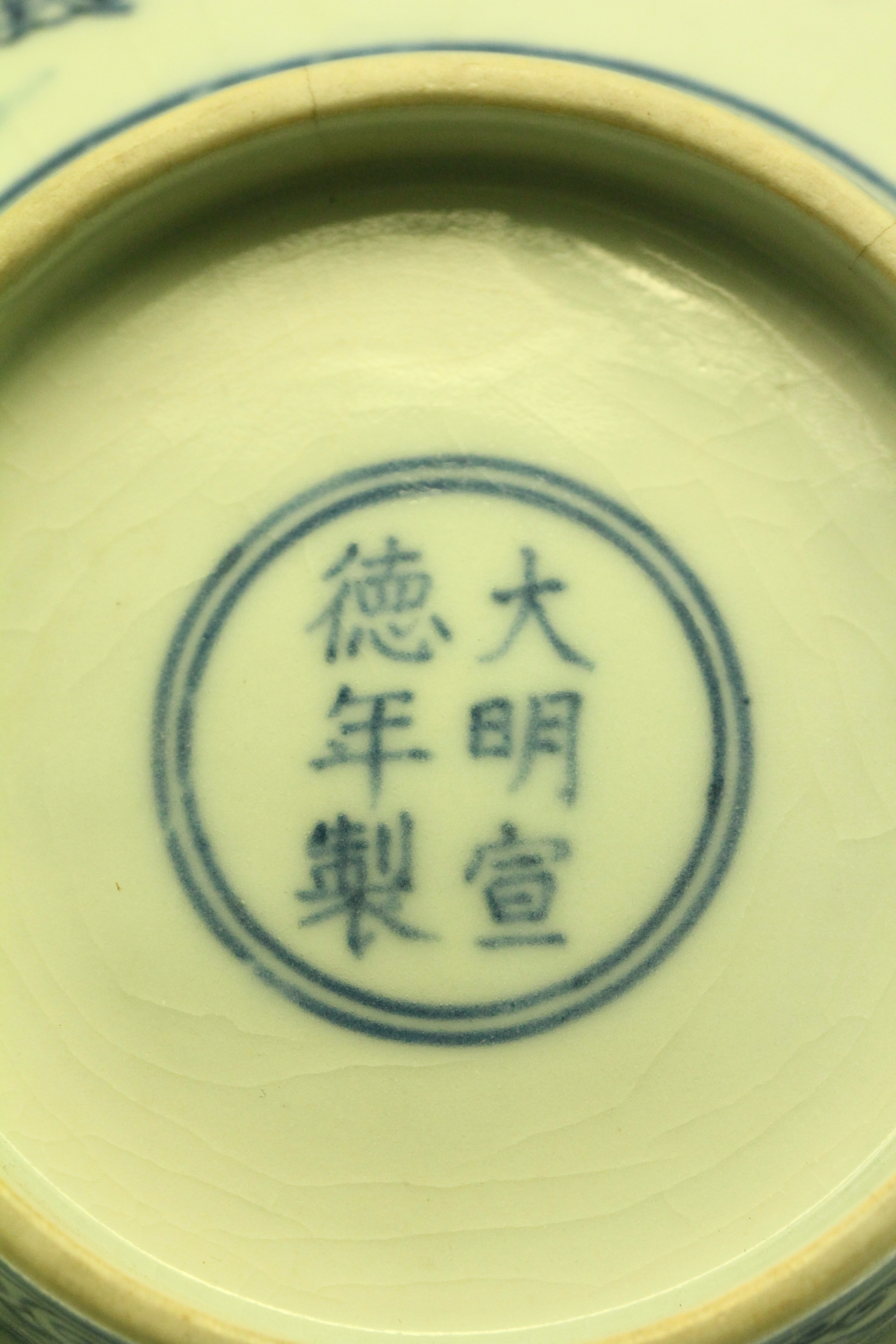 景德镇窑青花人物图碗底款。明宣德，公元1426年至1435年。展出于上海博物馆。